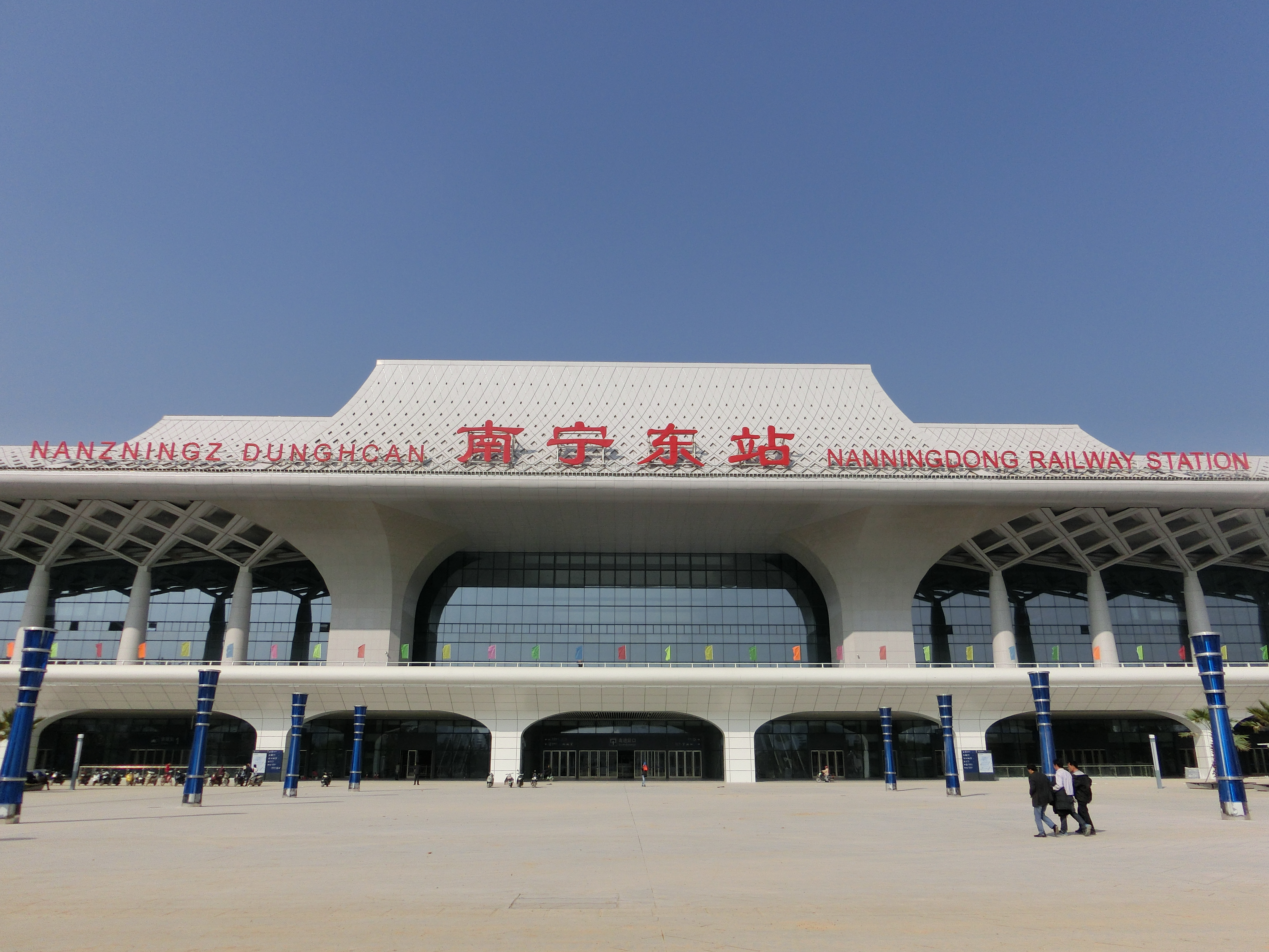 南宁火车东站